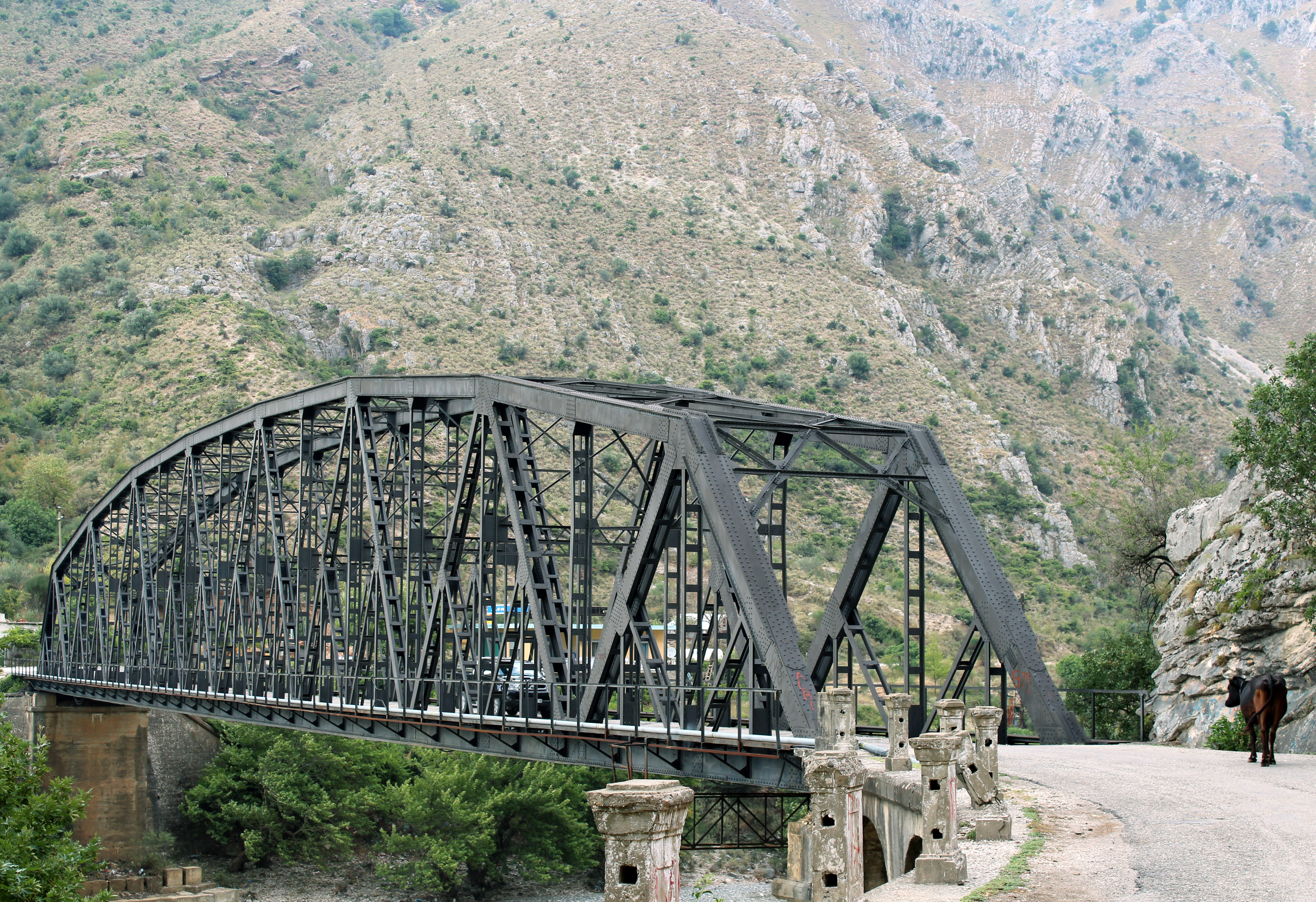 Ura Metalike e Dragotit